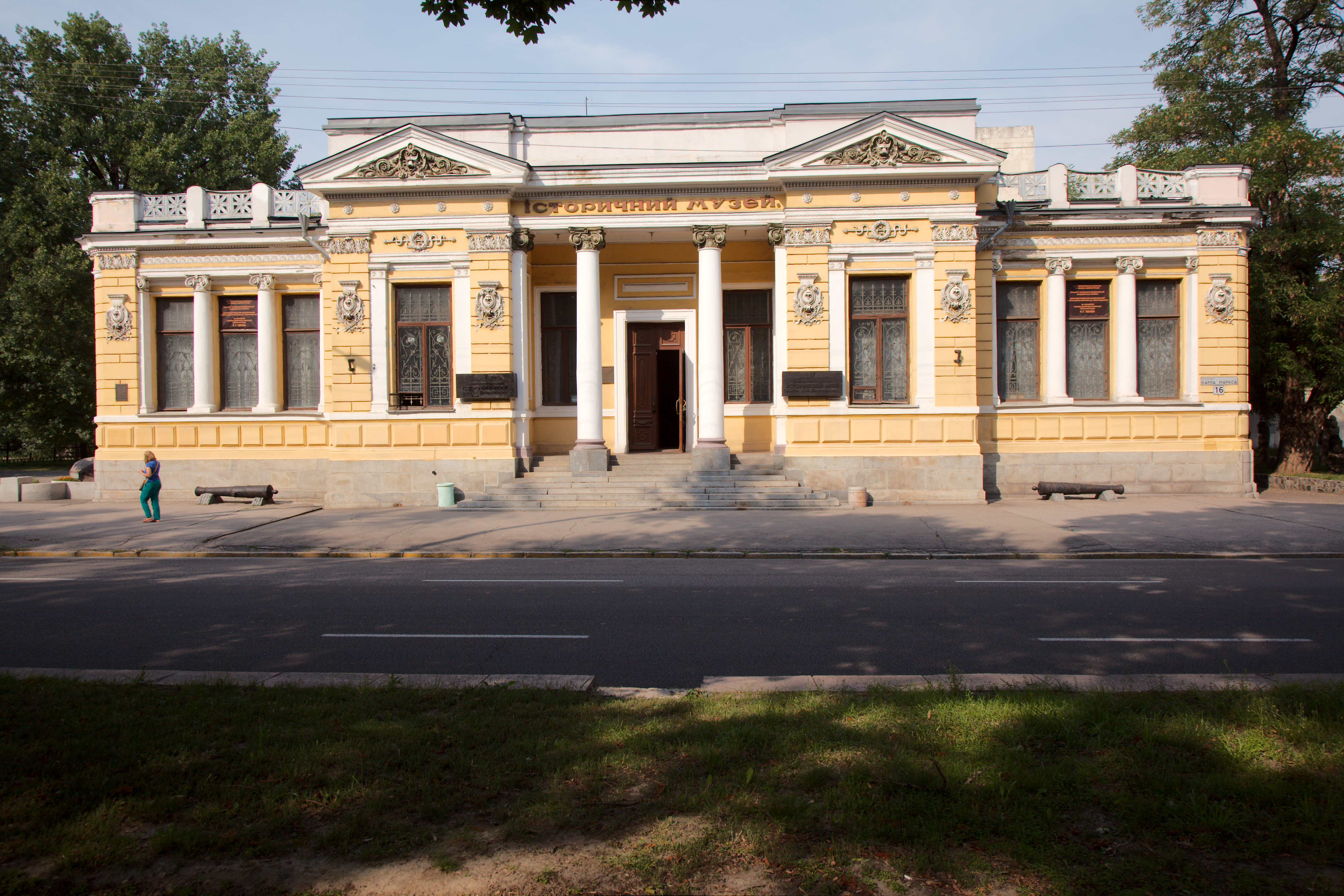 Dnipropetrovsk